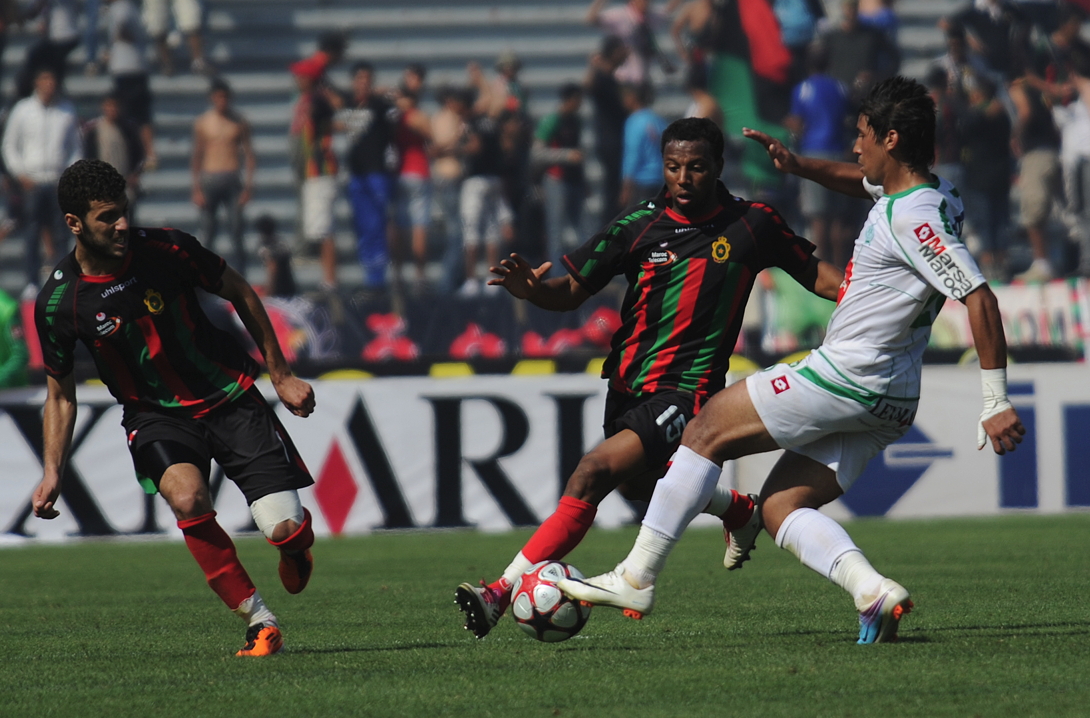 Raja vs FAR